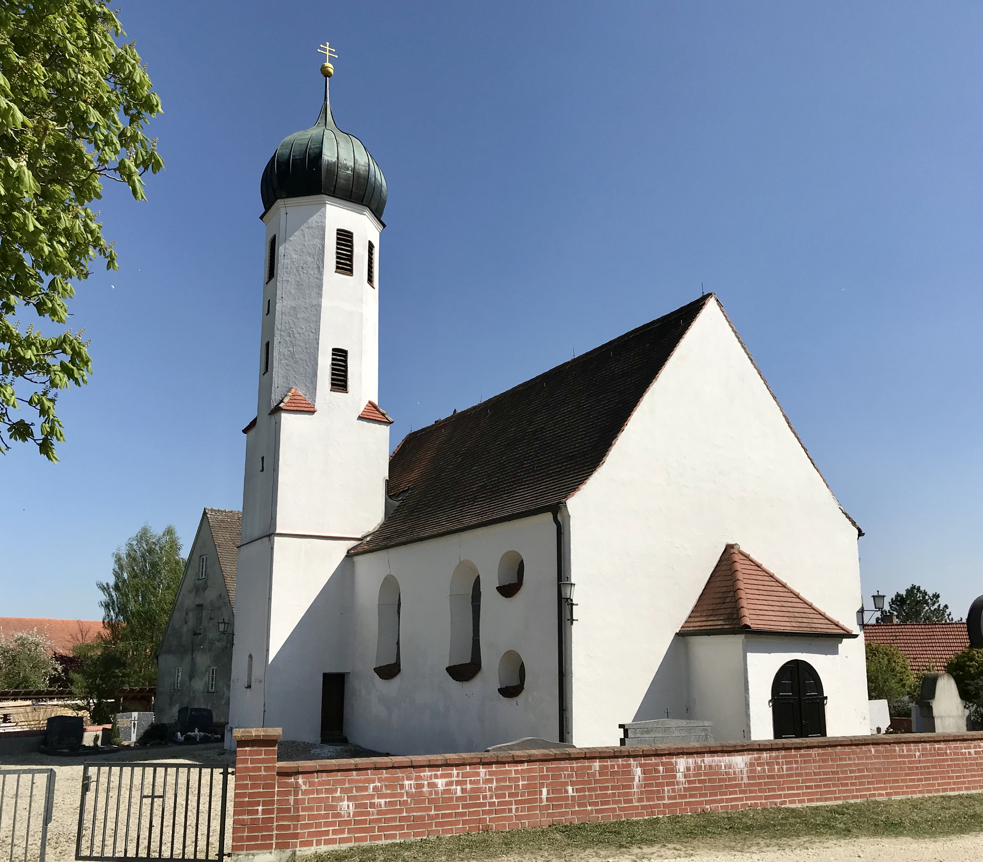 St. Laurentius (Heretshausen), Friedhofsseite